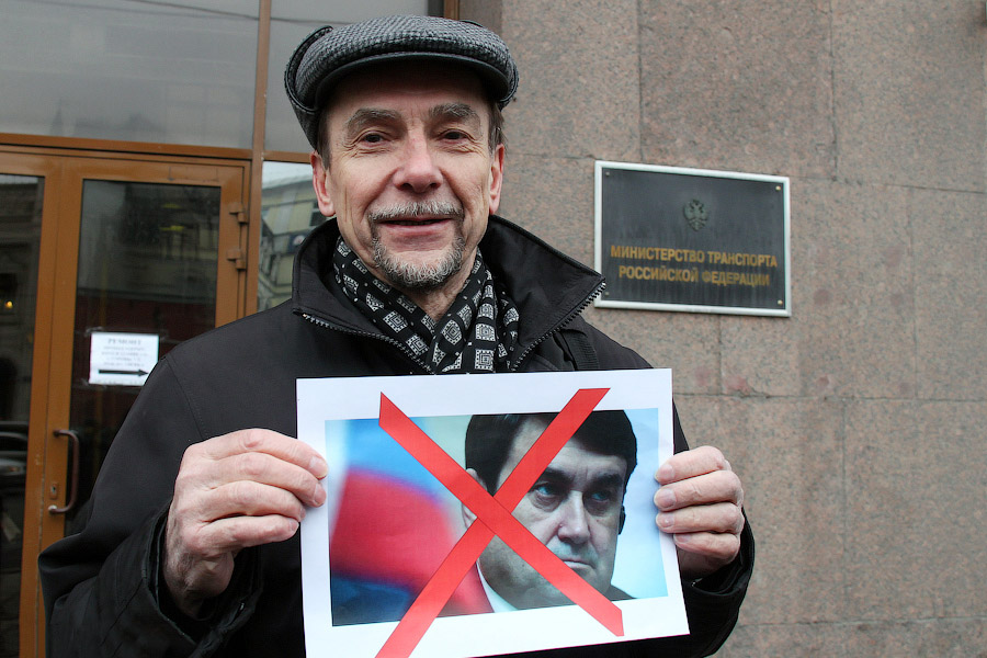 Лев Пономарев на митинге 2011